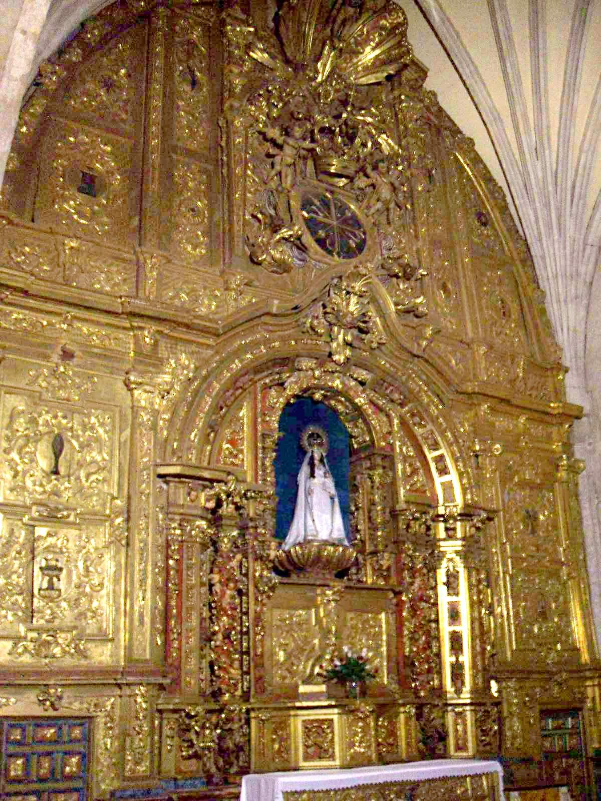 Iglesia de Santo Domingo, Soria